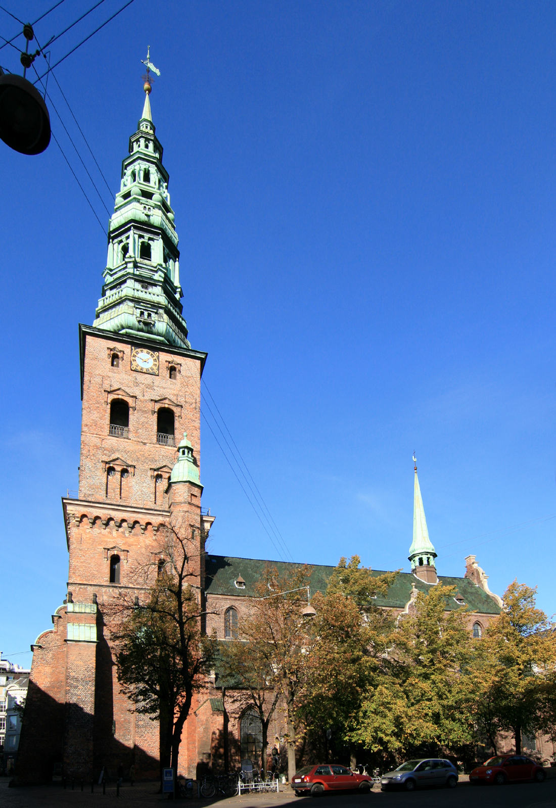 Sankt Nikolaj Kirke (Kunsthallen Nikolaj), Nikolaj Plads, København. Fredet.